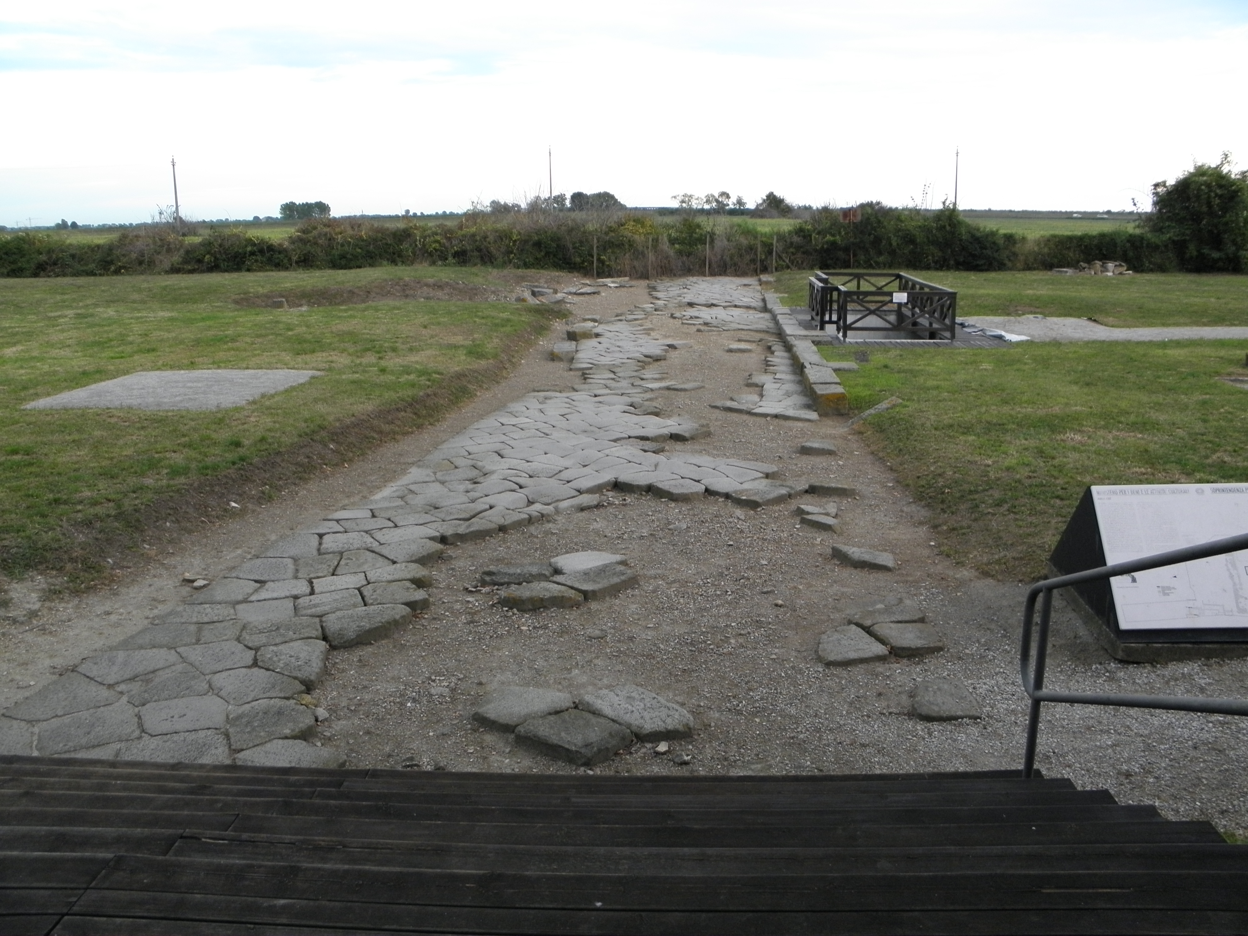 Altino, frazione di Quarto d'Altino: porzione della pavimentazione della Via Annia nei pressi di Altinum.